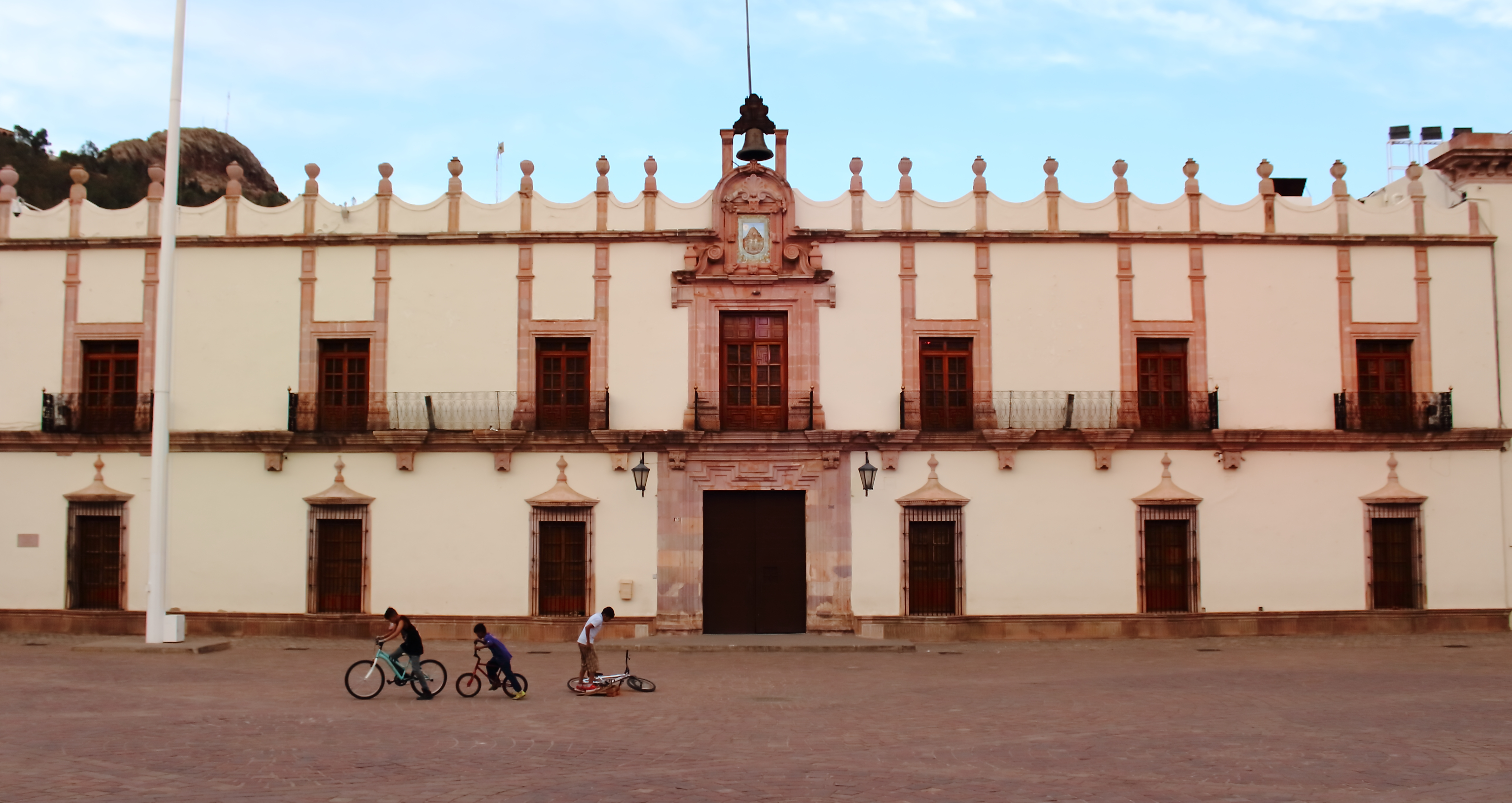 Palacio municipal de Zacatecas, México.